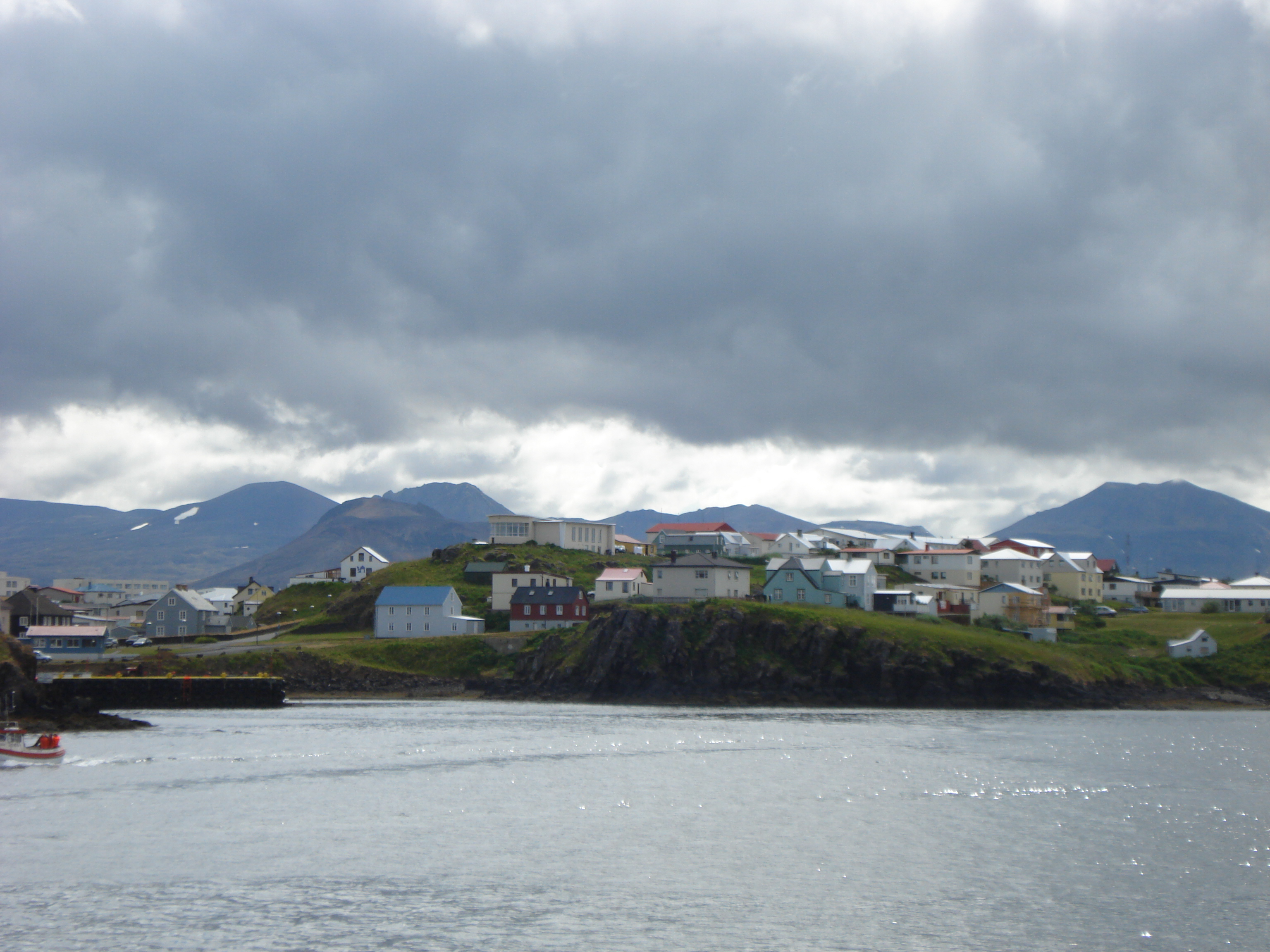 Stykkishólmur, Iceland